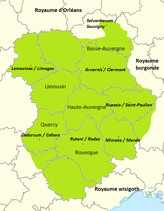 Auvergne mérovingienne lors du découpage de 511 (Thierry Ier).